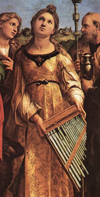 Extase de Sainte Cécile par le peintre Raphael - Détail - 1514